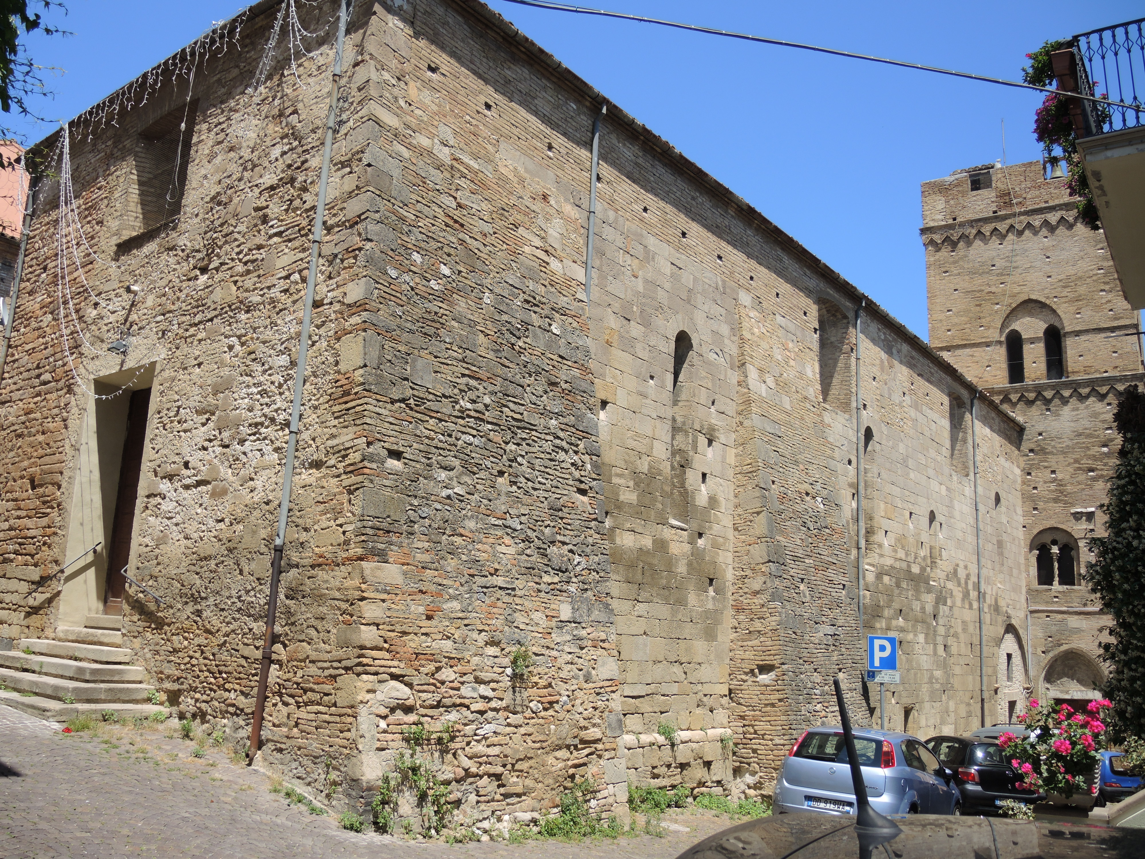 Lanciano - Chiesa di San Biagio